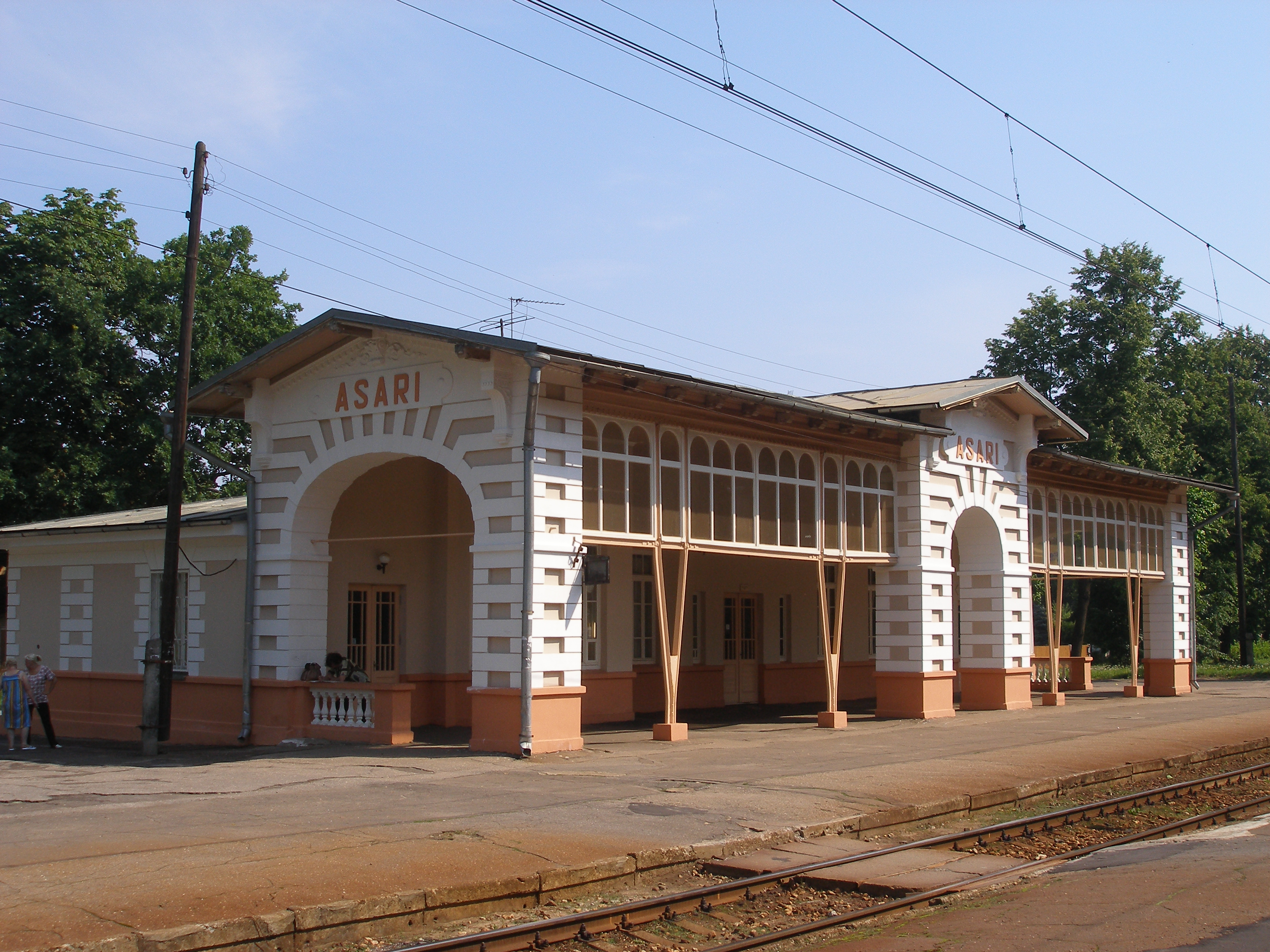 Asaru stacijas ēka.